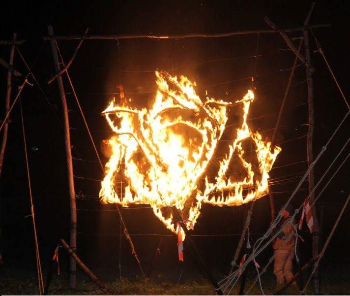 בטקס אש שנערך בנס ציונה מיוצג כמסורת הסניף סמל התנועה